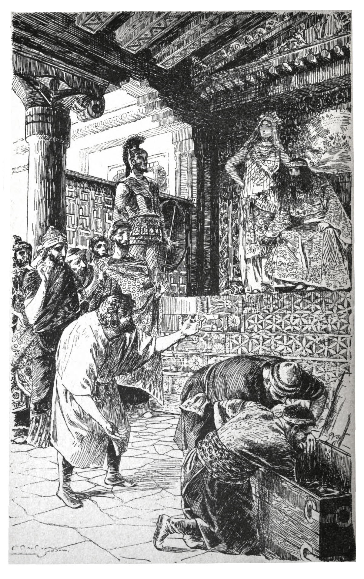 Illustration de la pièce de Théodore de Banville, Ésope.